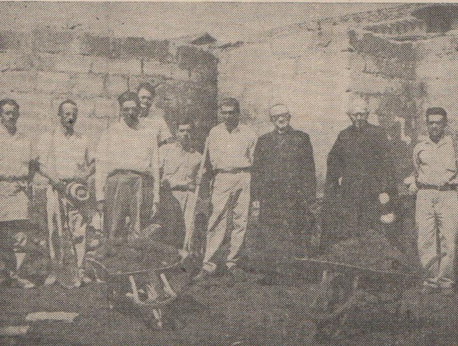 Cuadrilla de obreros que trabajarán en las obras de la Catedral de Sonsón.